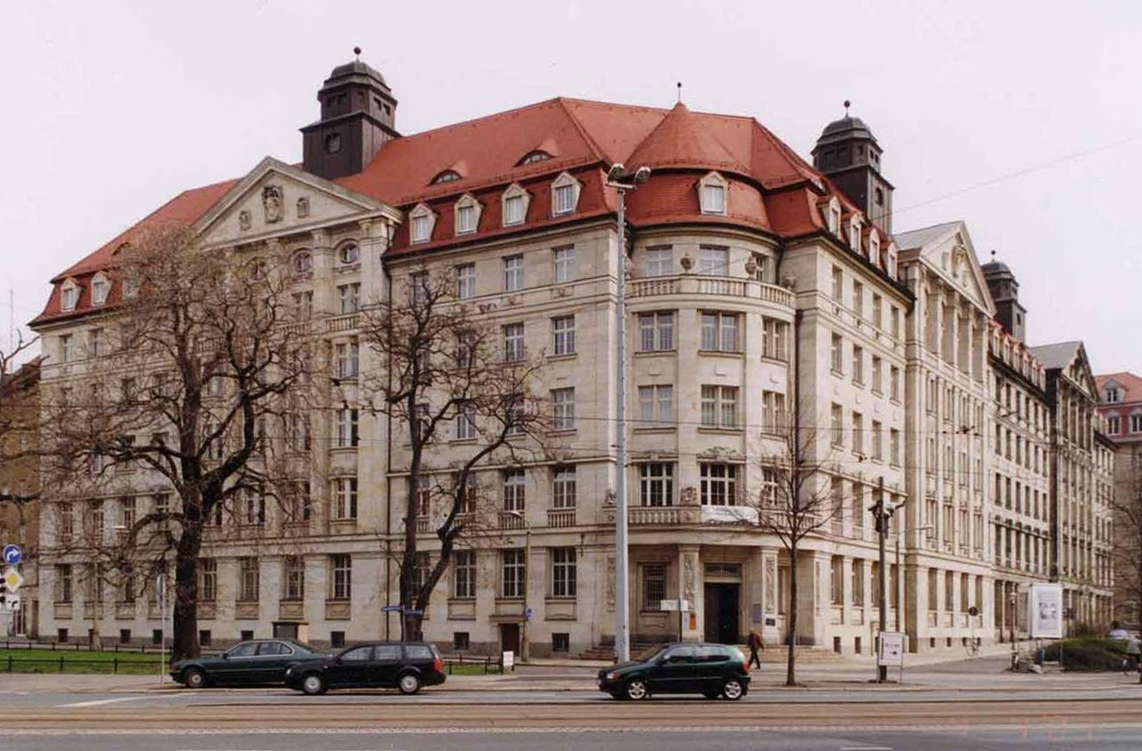 Ehemalige Bezirksverwaltung der Staatsssicherheit Leipzig, heute Gedenkstätte Museum „Runde Ecke“